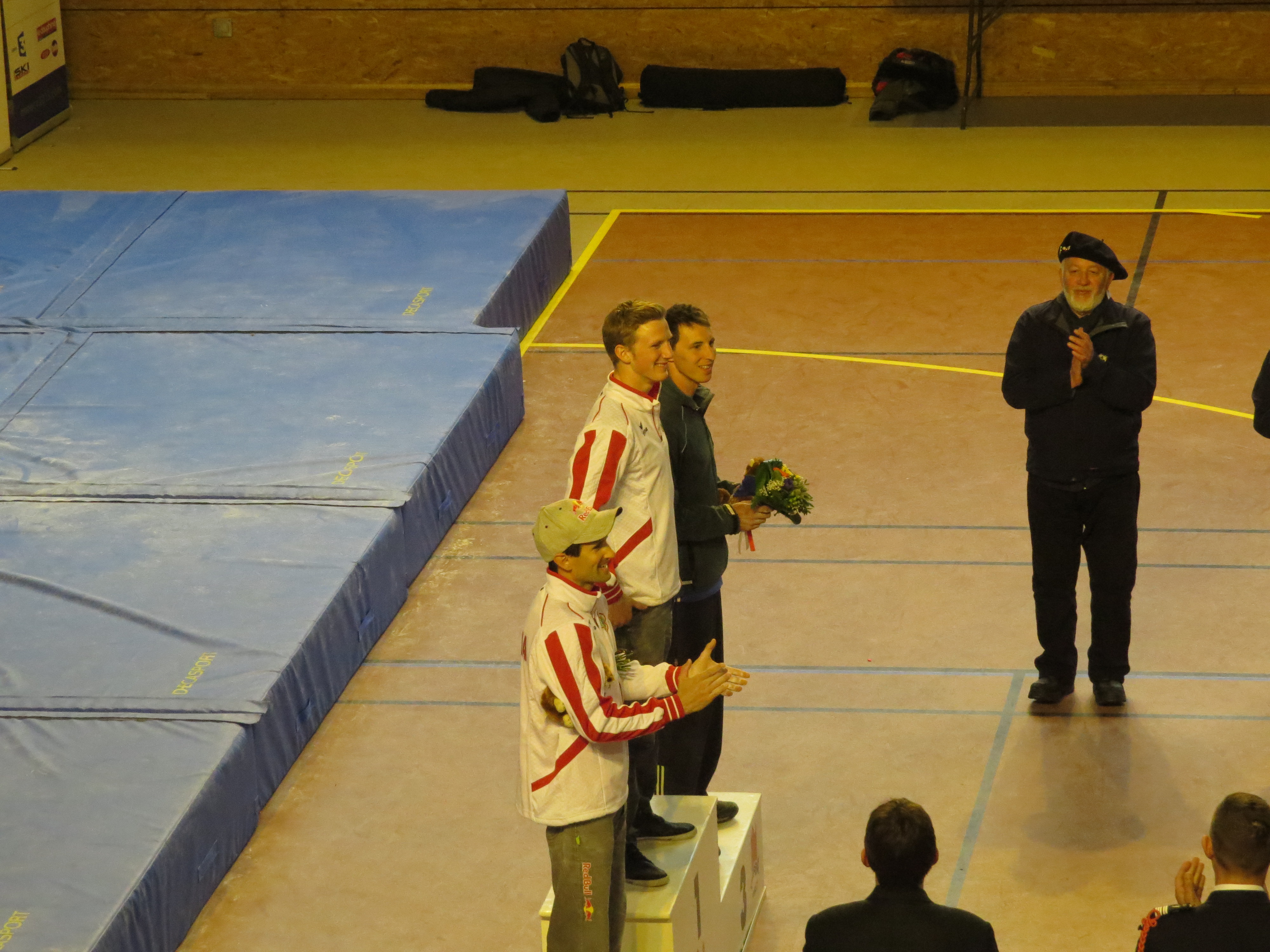 Photo réalisée le 28 mars